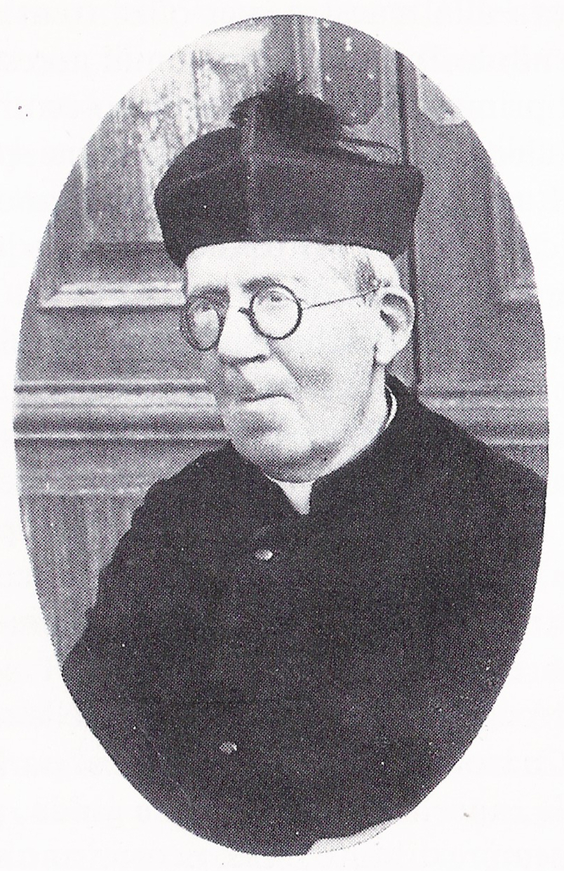 Don Guglielmo Stringari, parroco di Costabissara (Vicenza) per 45 anni